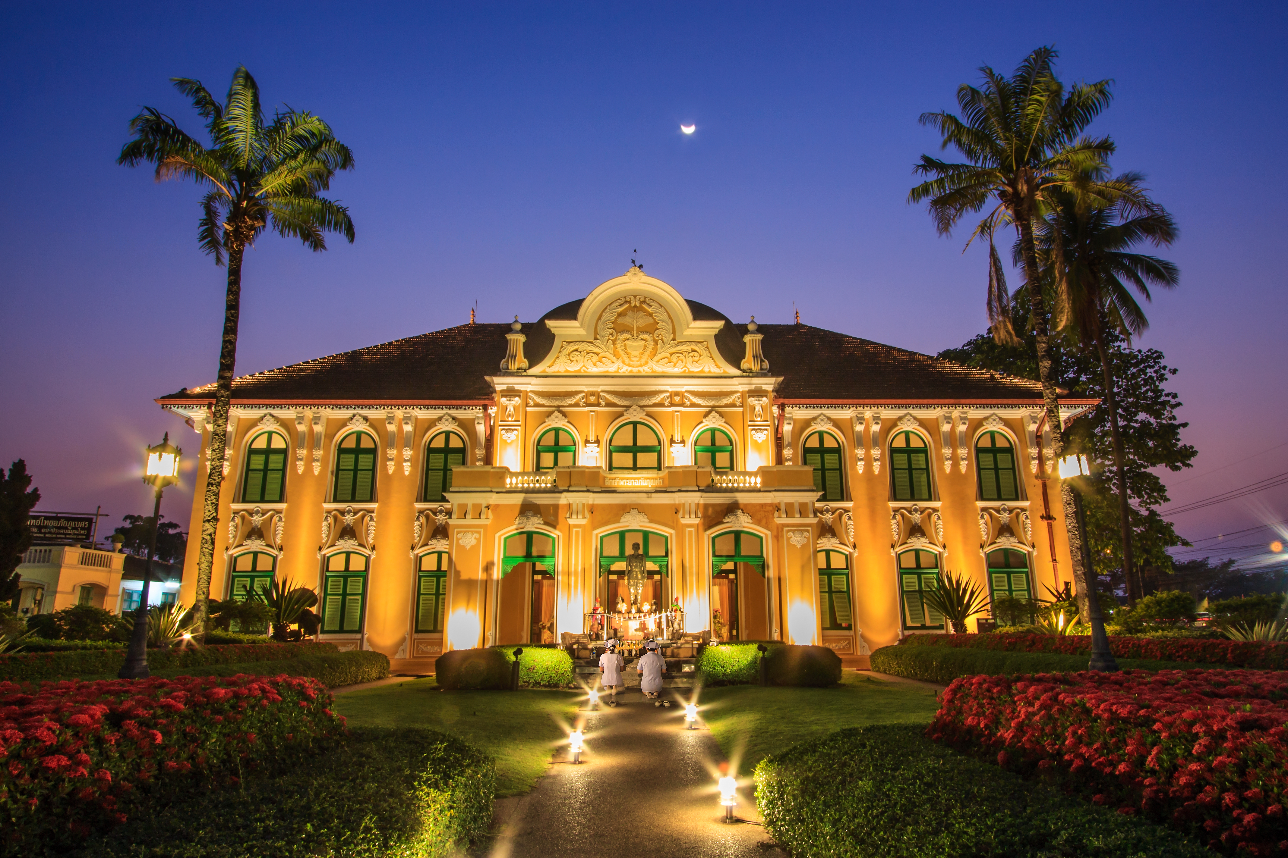 ตึกเจ้าพระยาอภัยภูเบศร